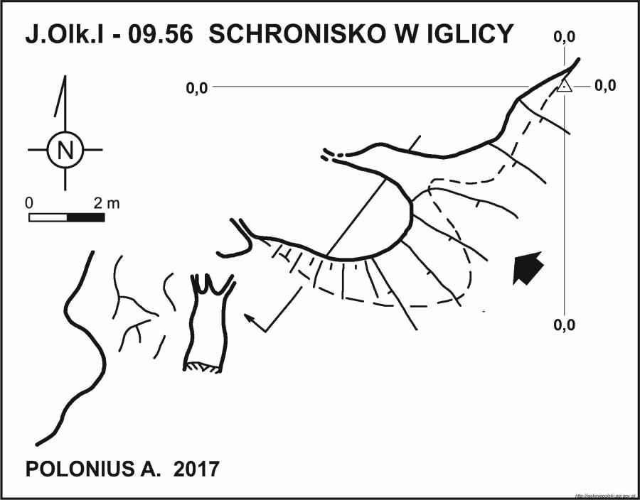 Schronisko w Iglicy - plan